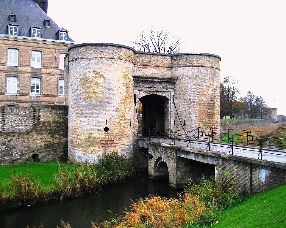 Bierensepoort uit 1585 (17 nov 2004) te Sint-Winoksbergen (Bergues) - eigen foto